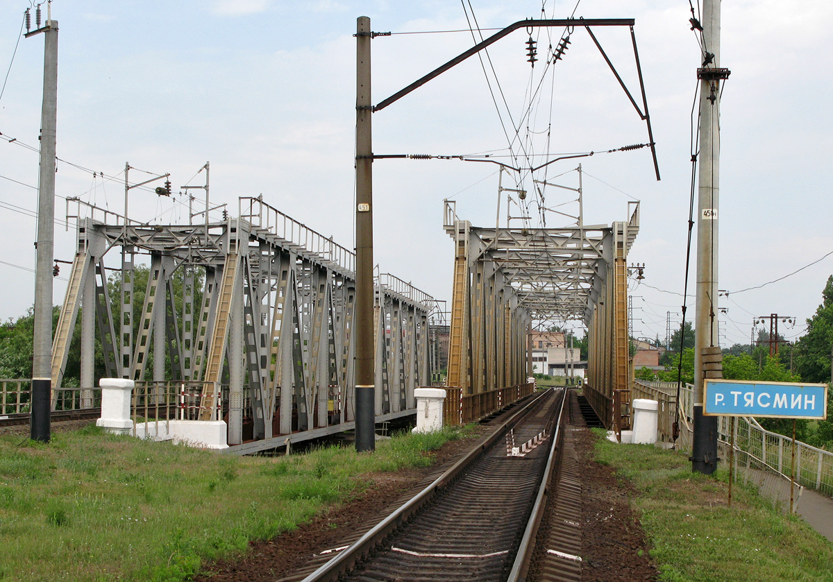 Міст через Тясмин у Смілі